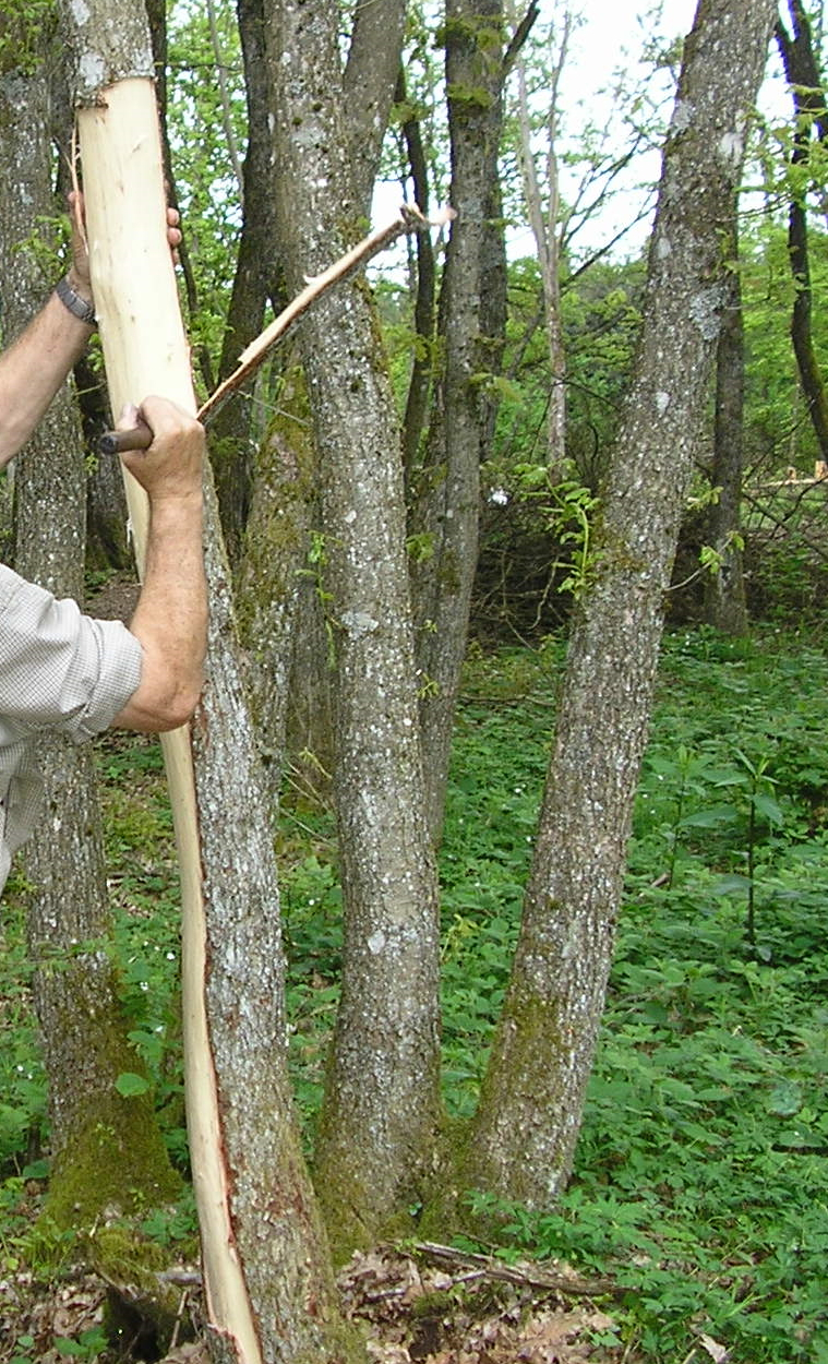 Die Eiche wird mannshoch geschält.